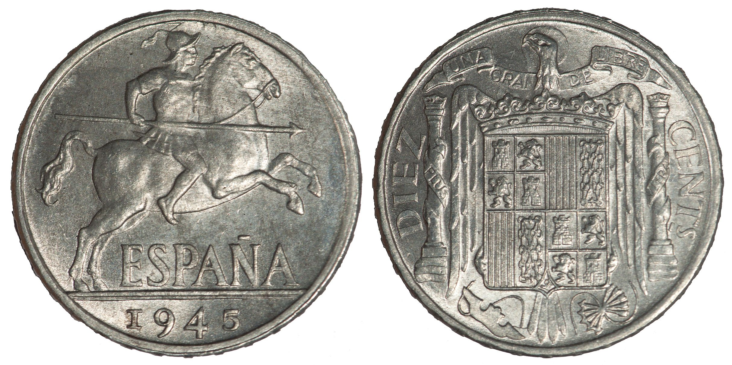 10 Céntimos 1945